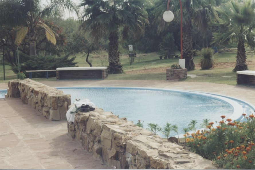 Piscina de agua fría en las Termas del Daymán, Salto, Uruguay.